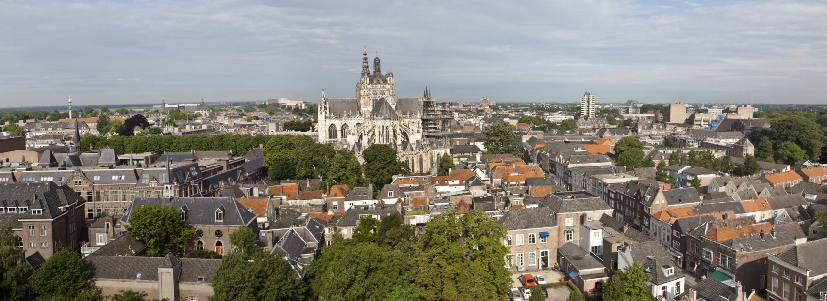 Sint-Jacobskerk: Gezicht op de Sint-Janskathedraal vanaf de toren